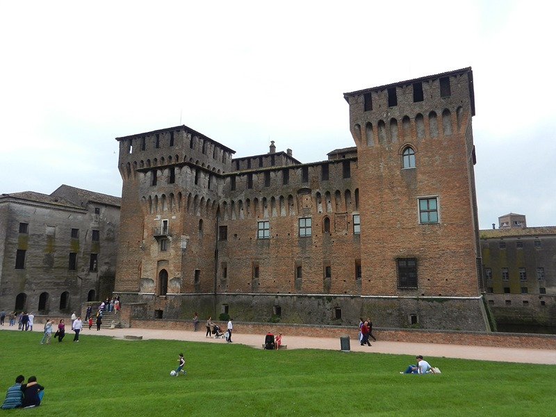 Mantova - Castello di S. Giorgio